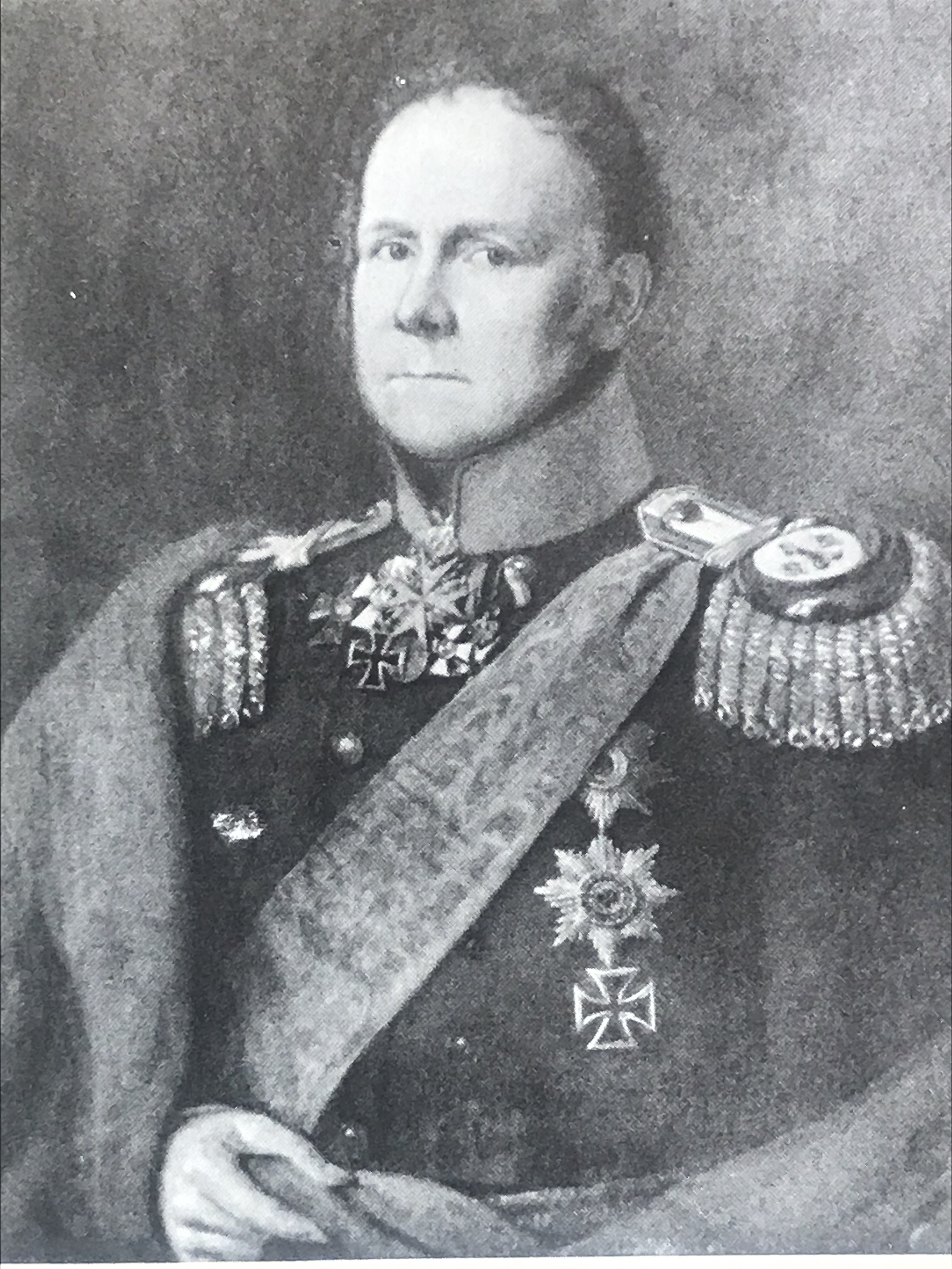 General des preußischen Kriegsministers, Generals der Infanterie und Chefs des 1. Infanterieregiments in Königsberg i.Pr. (Porträt anlässlich seines 50. Dienstjubiläums) - Ölgemälde vermutlich von Johann Jakob Kirchhoff, 1838